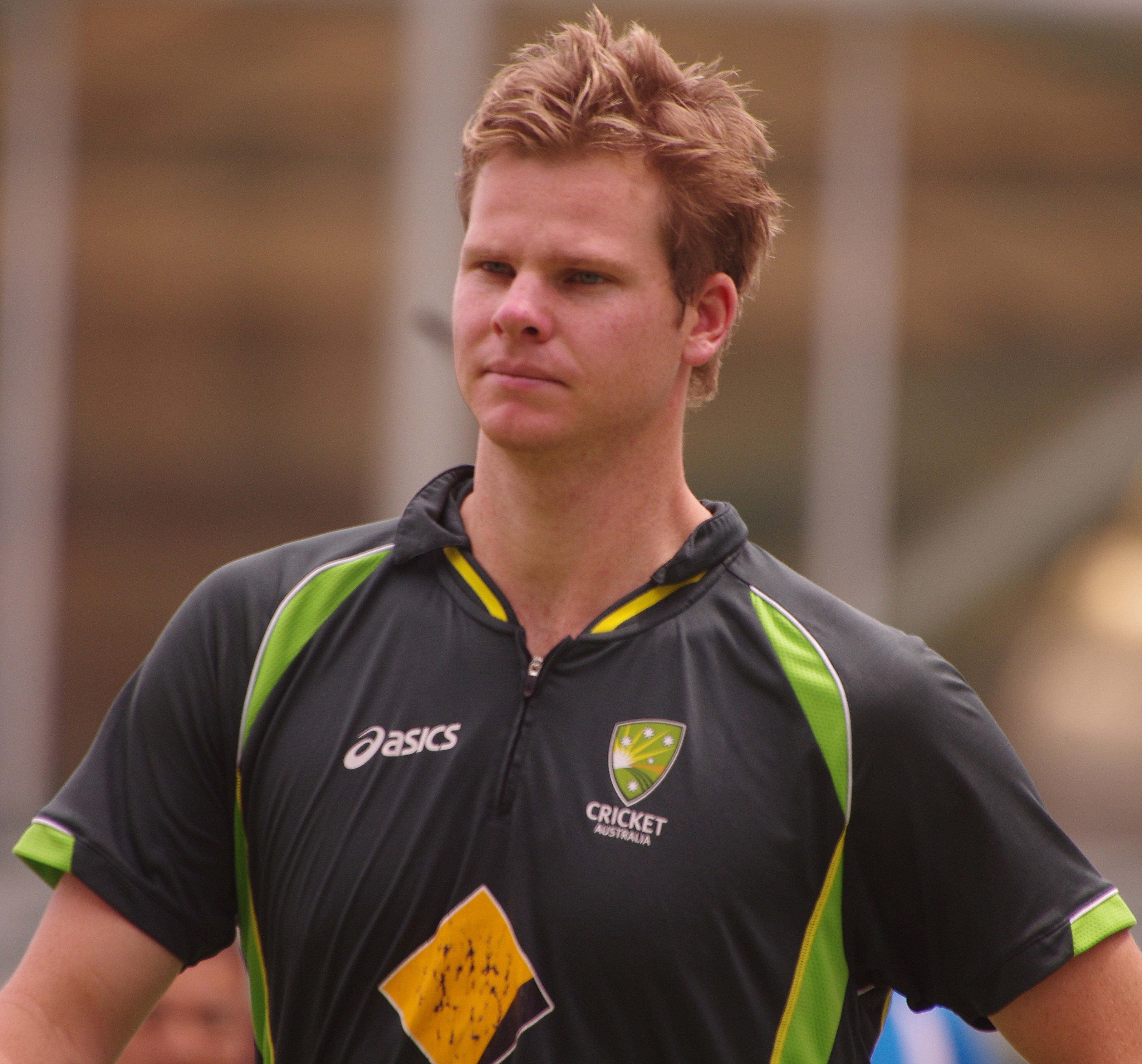 STEVE SMITH